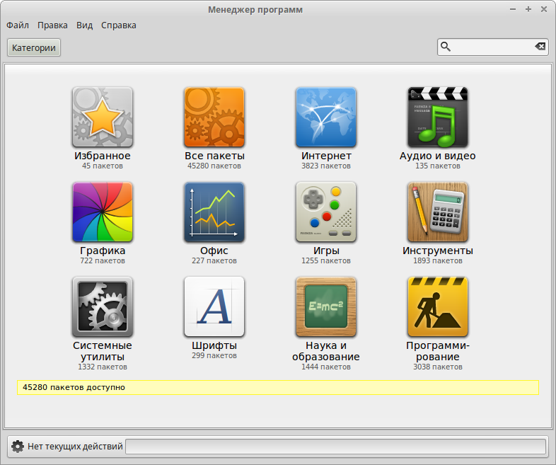 Менеджер программ в Linux Mint 17.2 Rafaela Xfce